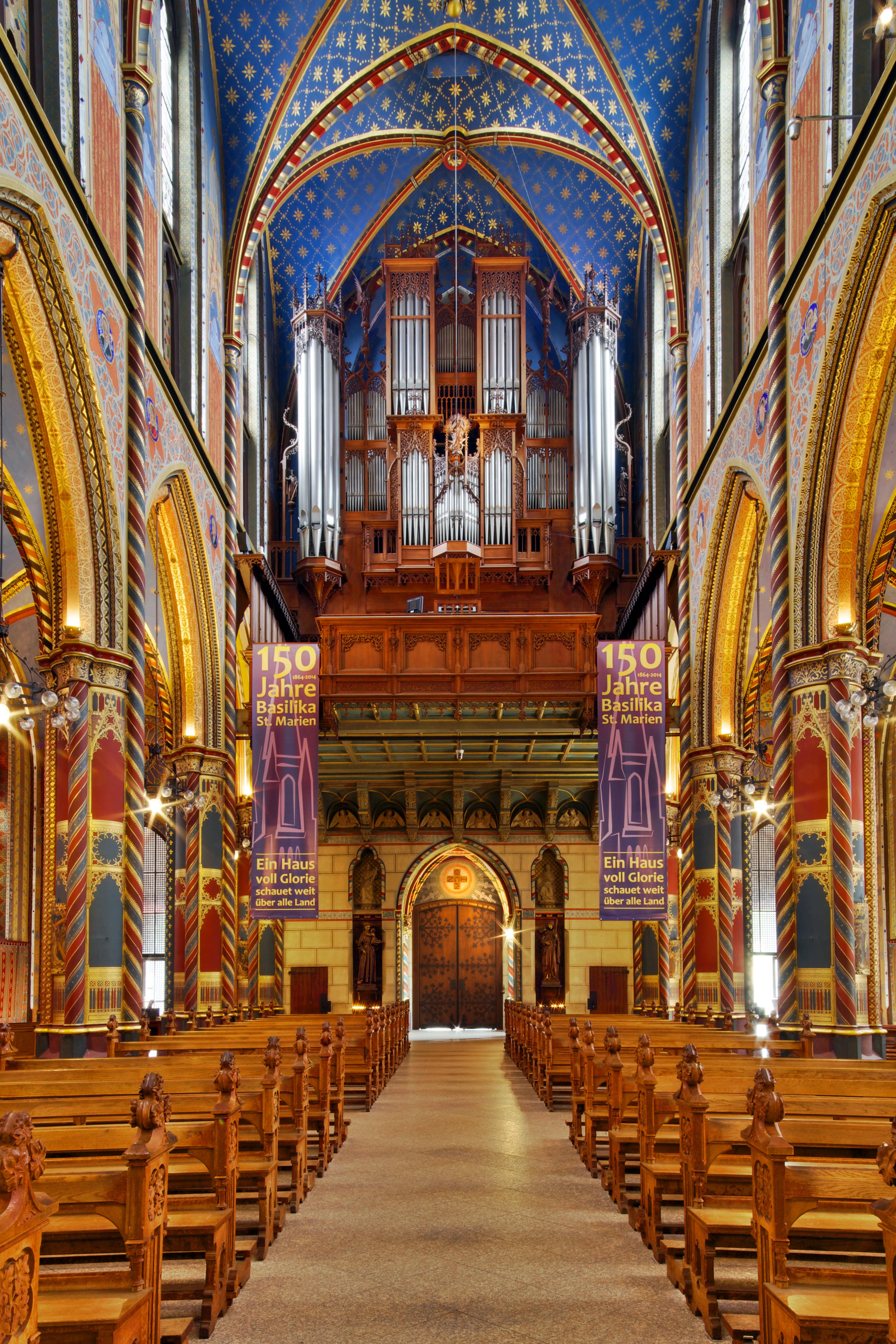 Orgel , Marienbasilika KevelaerThis is a photograph of an architectural monument., no. A12